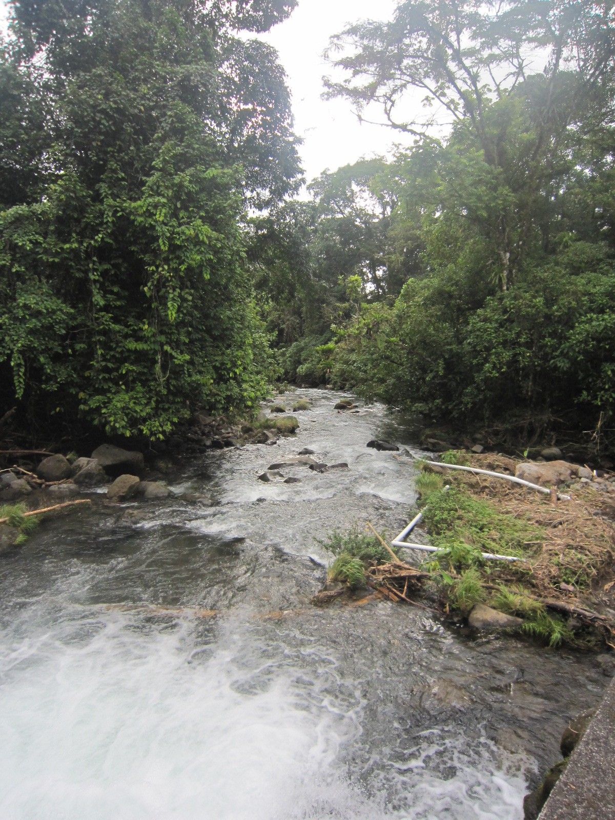 Río Arenal a su paso por La Fortuna de San Carlos, Costa Rica.